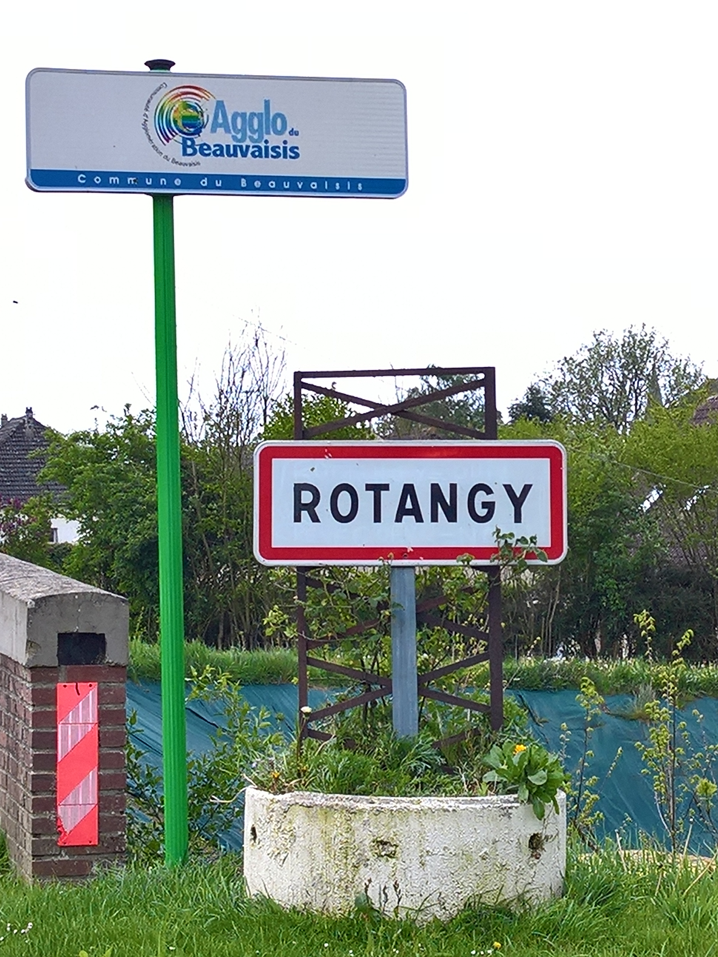 Rotangy : Panneau d'entrée d'agglomération sur la rue de Crèvecœur.